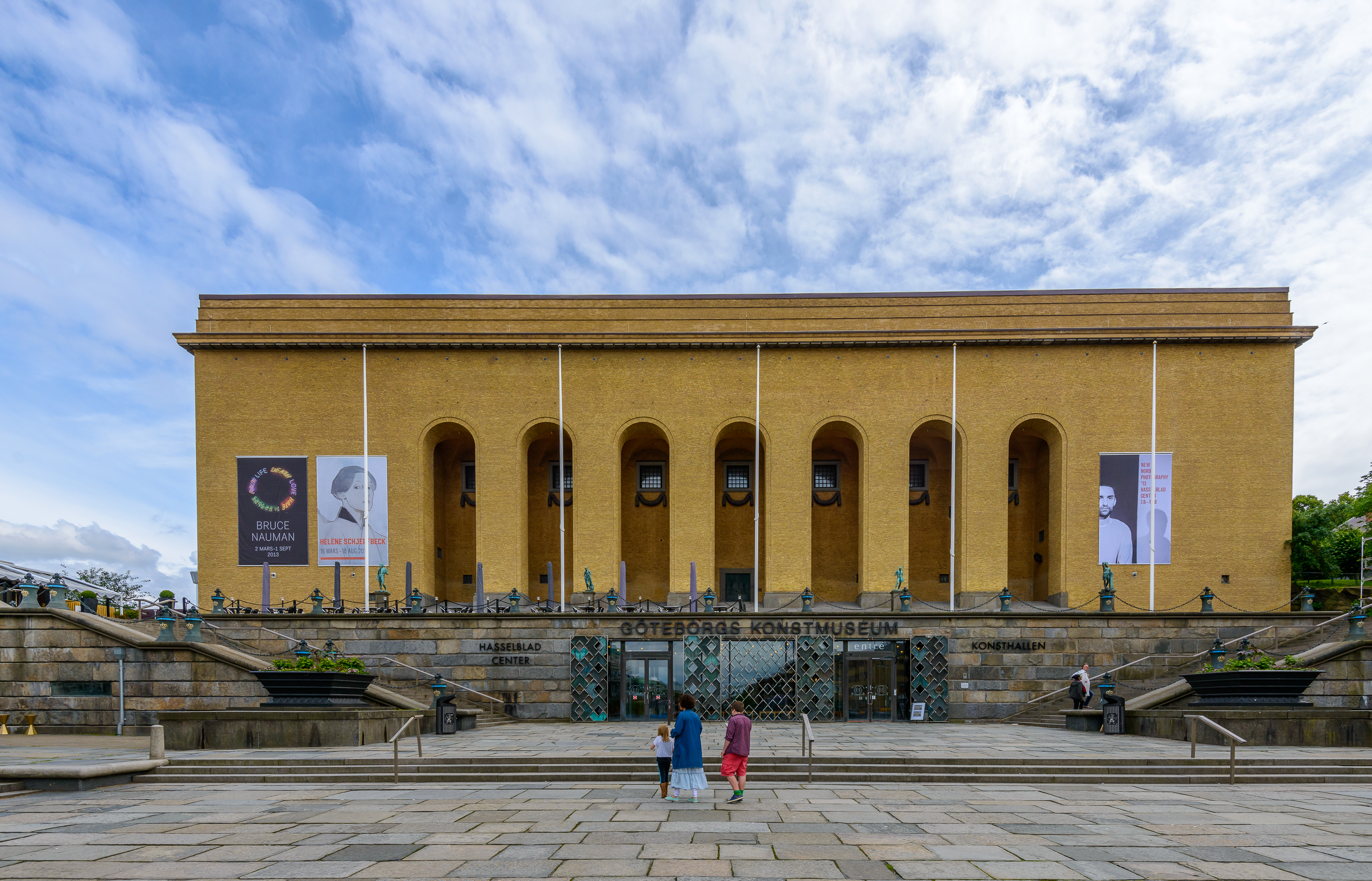 Konstmuseet i Göteborg. sommaren 2013.